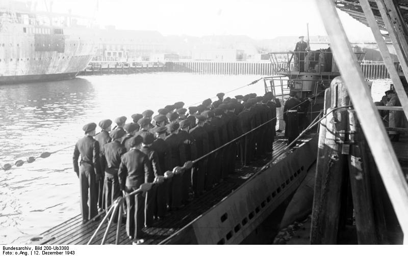 Indienststellung G 684/U 250 am 12.12.1943